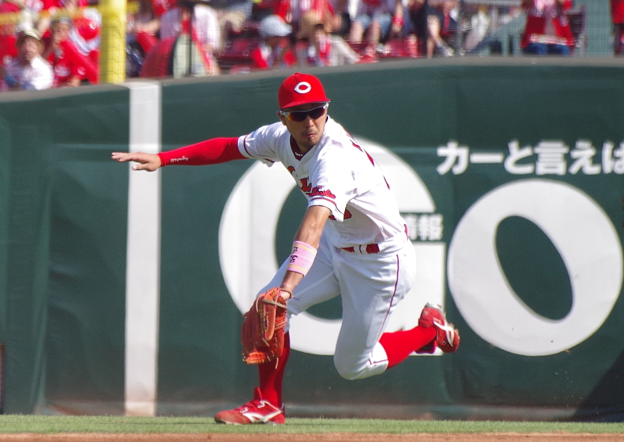 広島東洋カープ菊池涼介 マツダスタジアムにて 投稿者による撮影